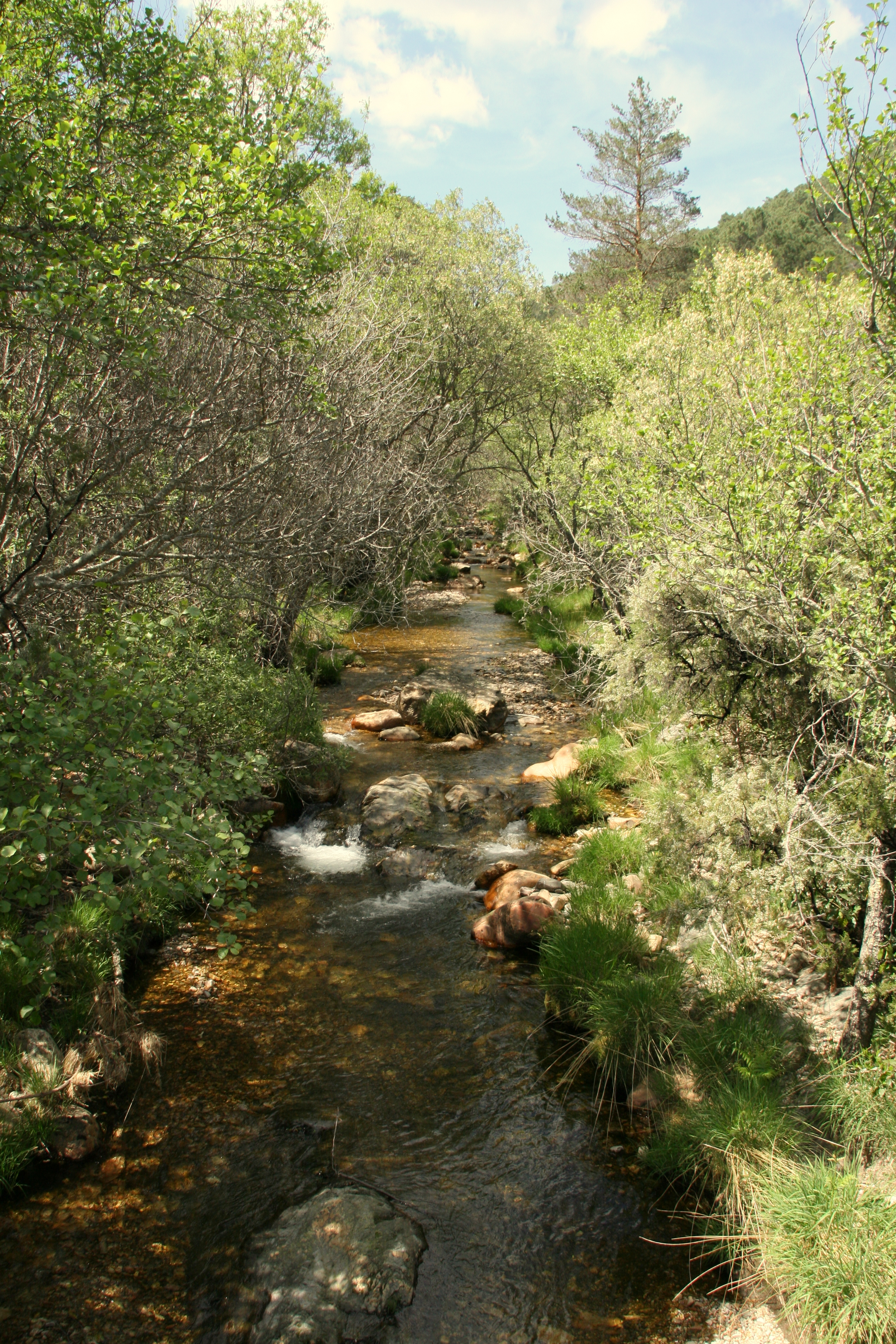 Río Batuecas This is a photography of a Site of Community Importance in Spain with the ID: ES4150107. Natura2000 entry, EEA entry